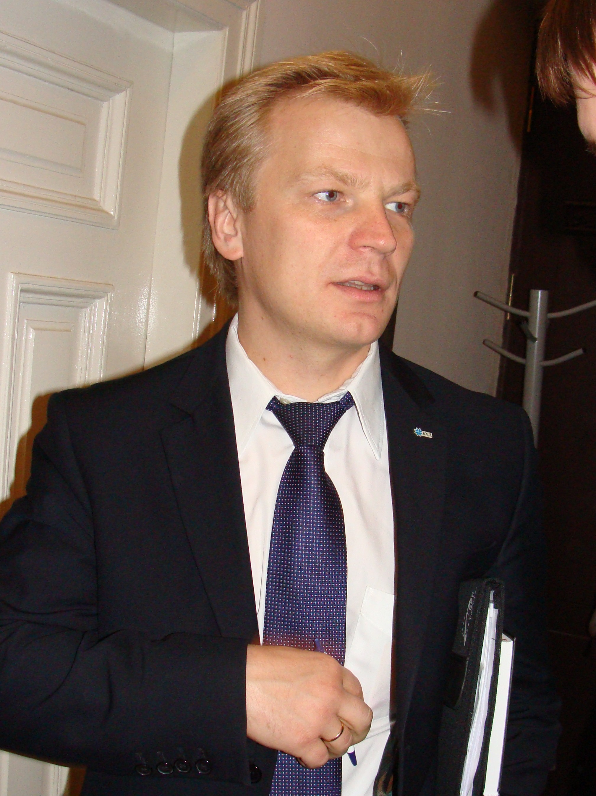 Wital Rymaszeuski na otwarciu Białoruskiego Domu w Warszawie na ul. Wiejskiej 13/3